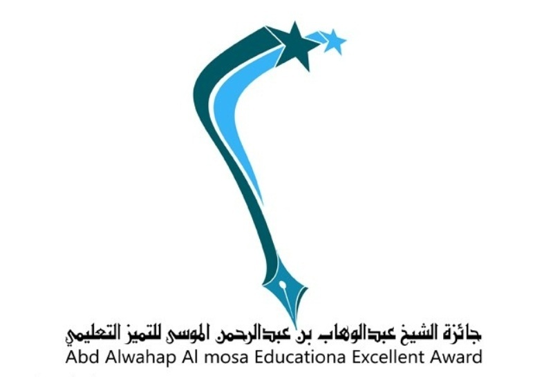 شعار جائزة الشيخ عبدالوهاب الموسى للتميز التعليمي